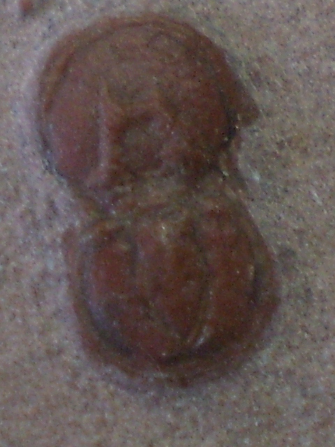 アグノスタス目の三葉虫の画像